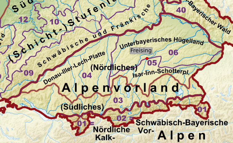 Haupteinheitengruppen von Alpenvorland und Alpen mit der Lage von Freising.